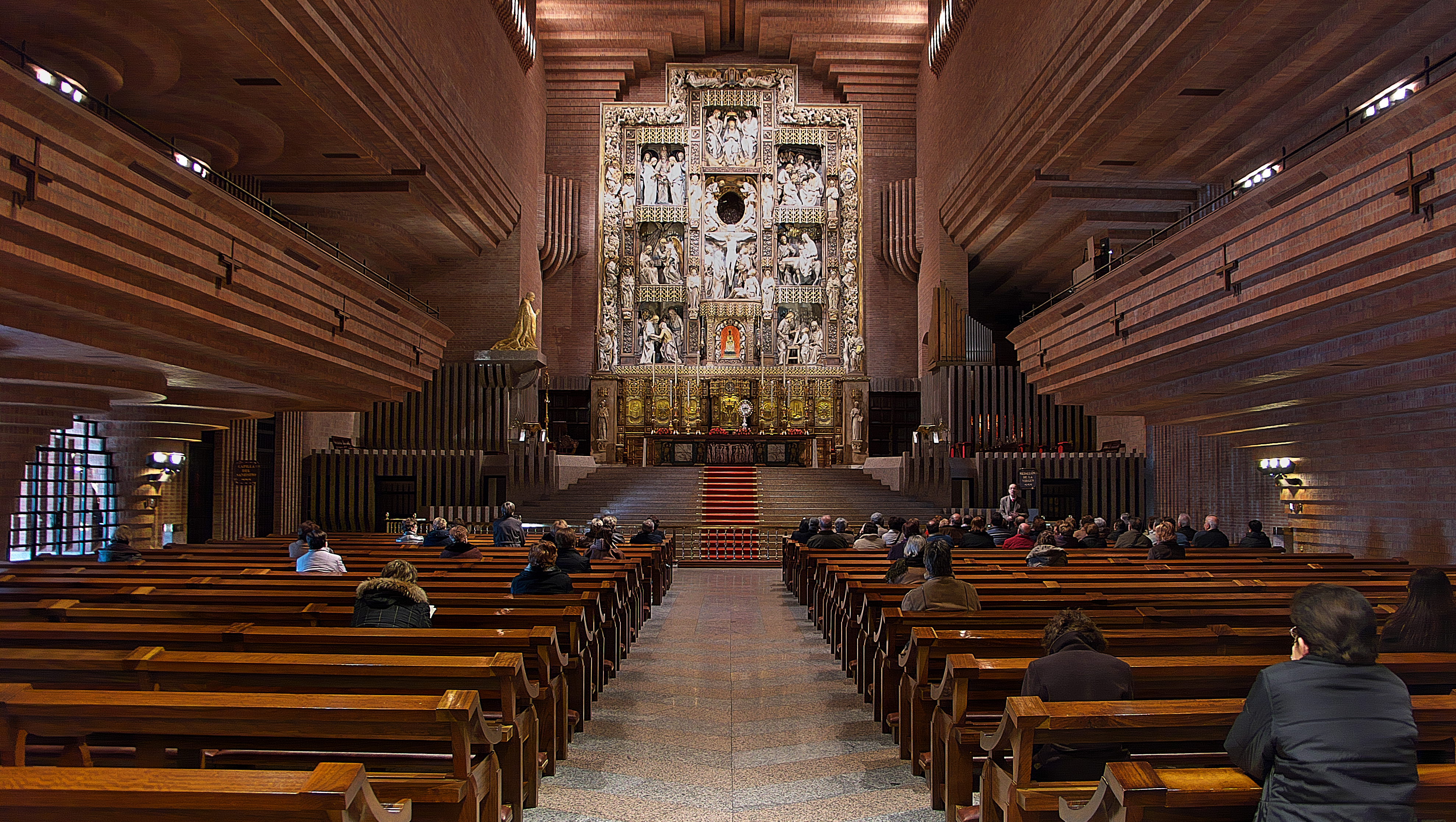 Iglesia del Santuario de Torreciudad. Arquitecto, Heliodoro Dols Morell (1975)